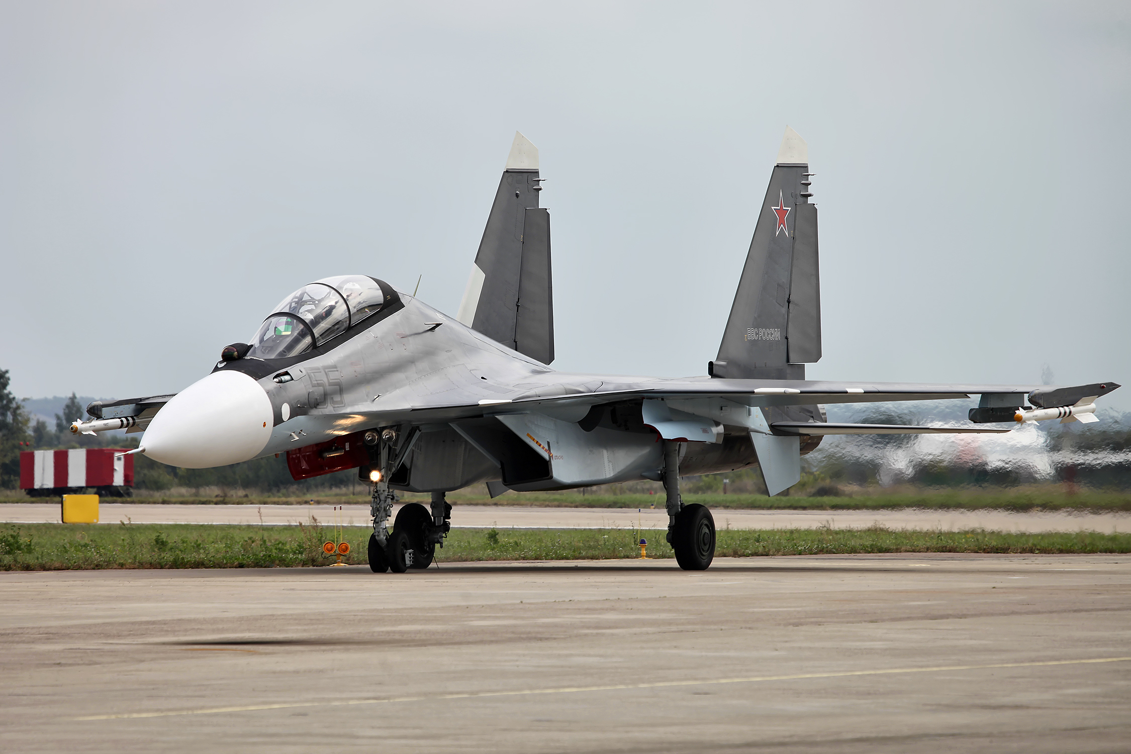 Су-30СМ (Su-30SM)